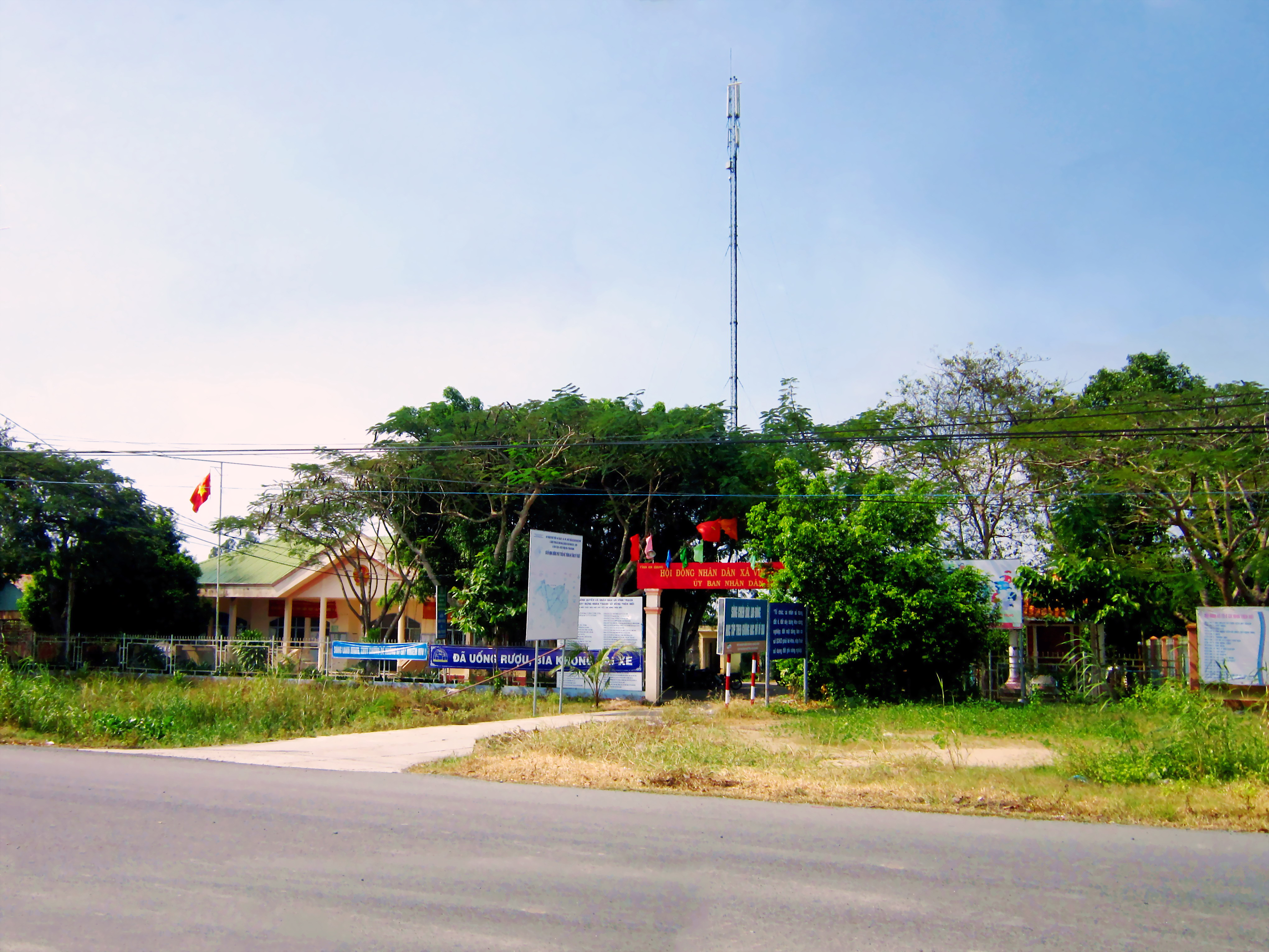 Ủy ban Nhân dân xã Vĩnh Trạch, huyện Thoại Sơn, tỉnh An Giang, Việt Nam.